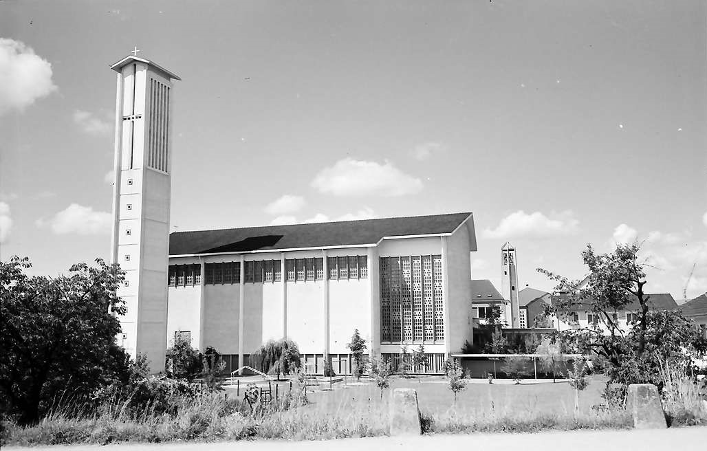 Weil am Rhein-Friedlingen: Kirche zum Guten Hirten, rechts im Hintergrund die Friedenskirche im Jahr 1963